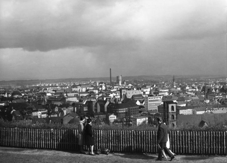 Stadtaufnahmen Bielefeld Blick auf Bielefeld